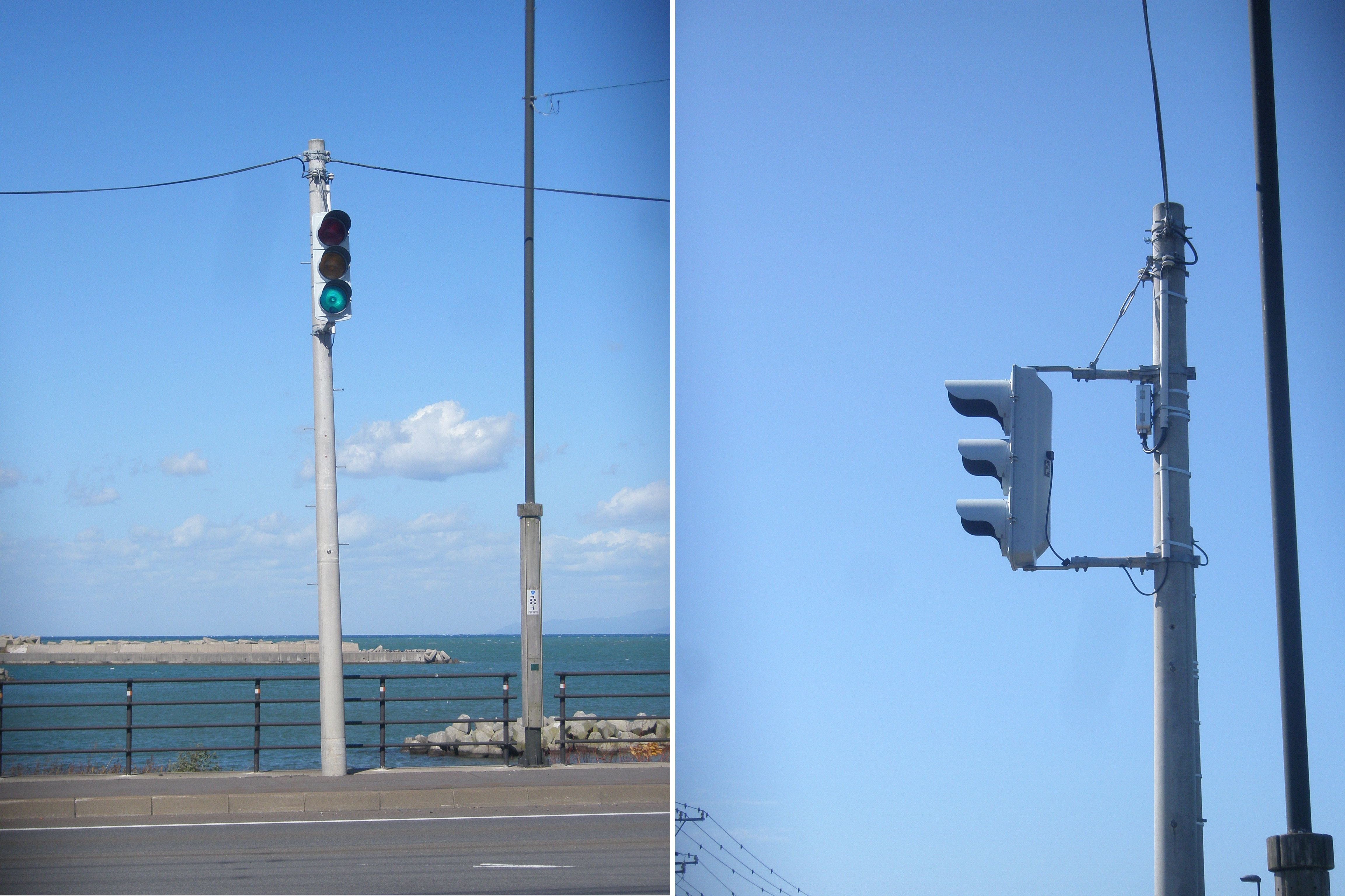 海側からの強風対策として、短いアームで信号柱の風下側に取り付けた信号機（2枚合成、左：正面、右：横側）